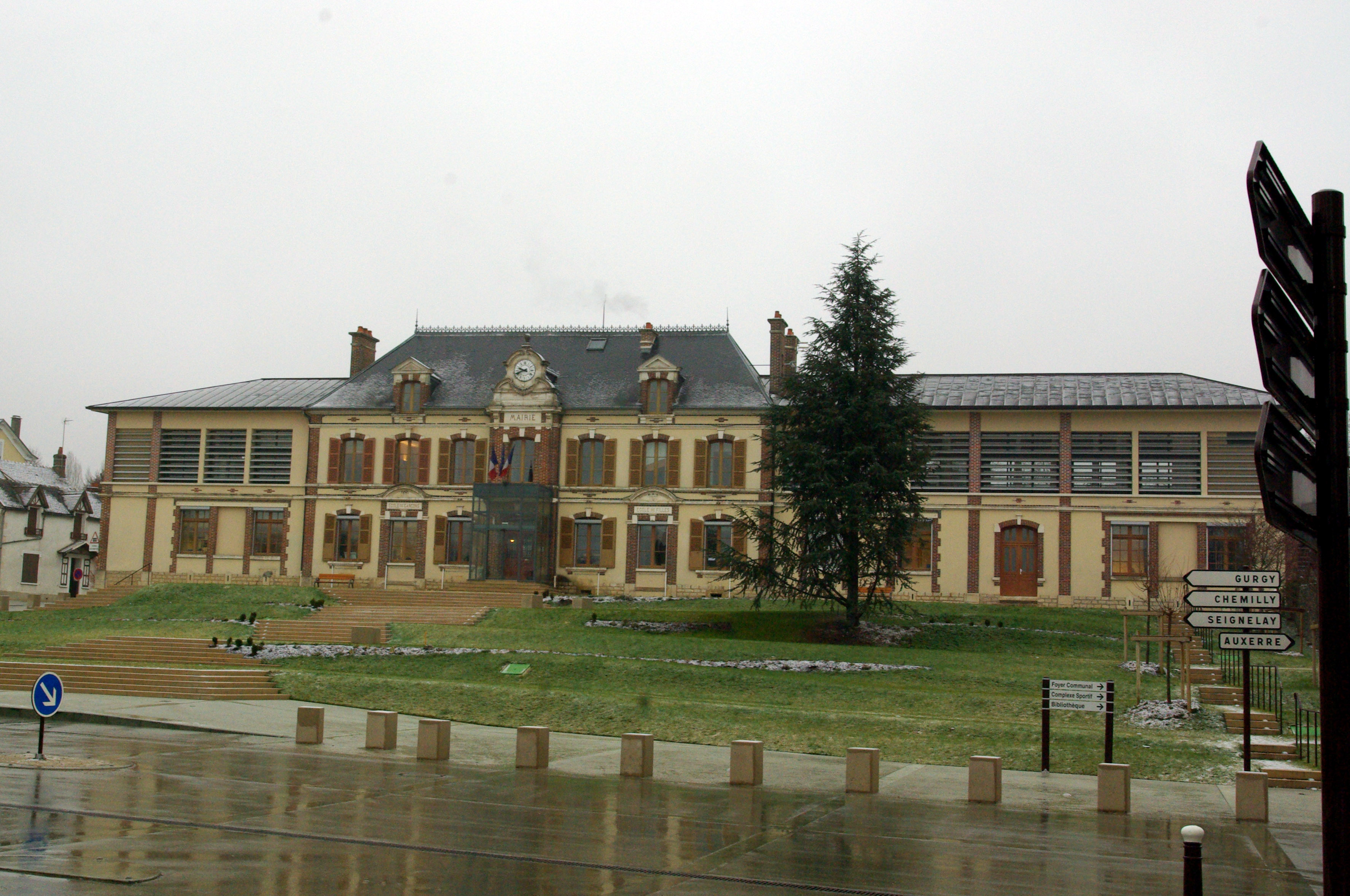 Mairie de Monéteau